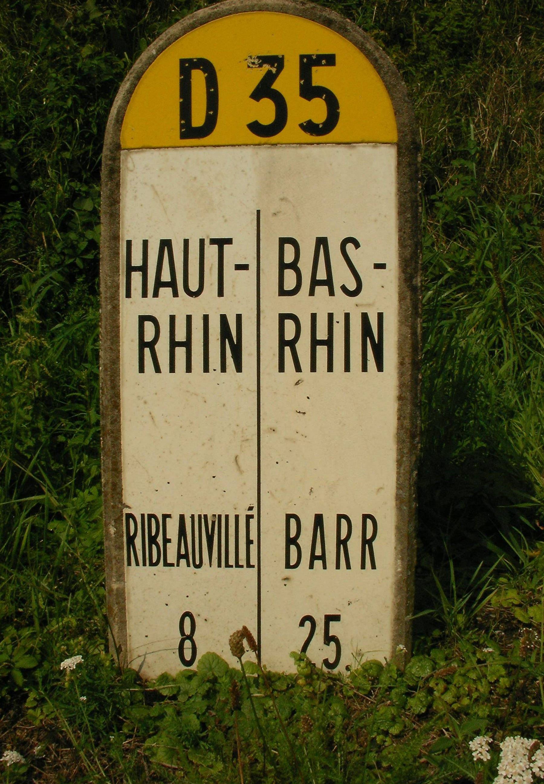 Borne frontière entre le Bas-Rhin et le Haut-Rhin (France).